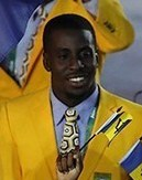 Делегация Барбадоса на открытии Летних Олимпийских игр 2016 в Рио-де-Жанейро